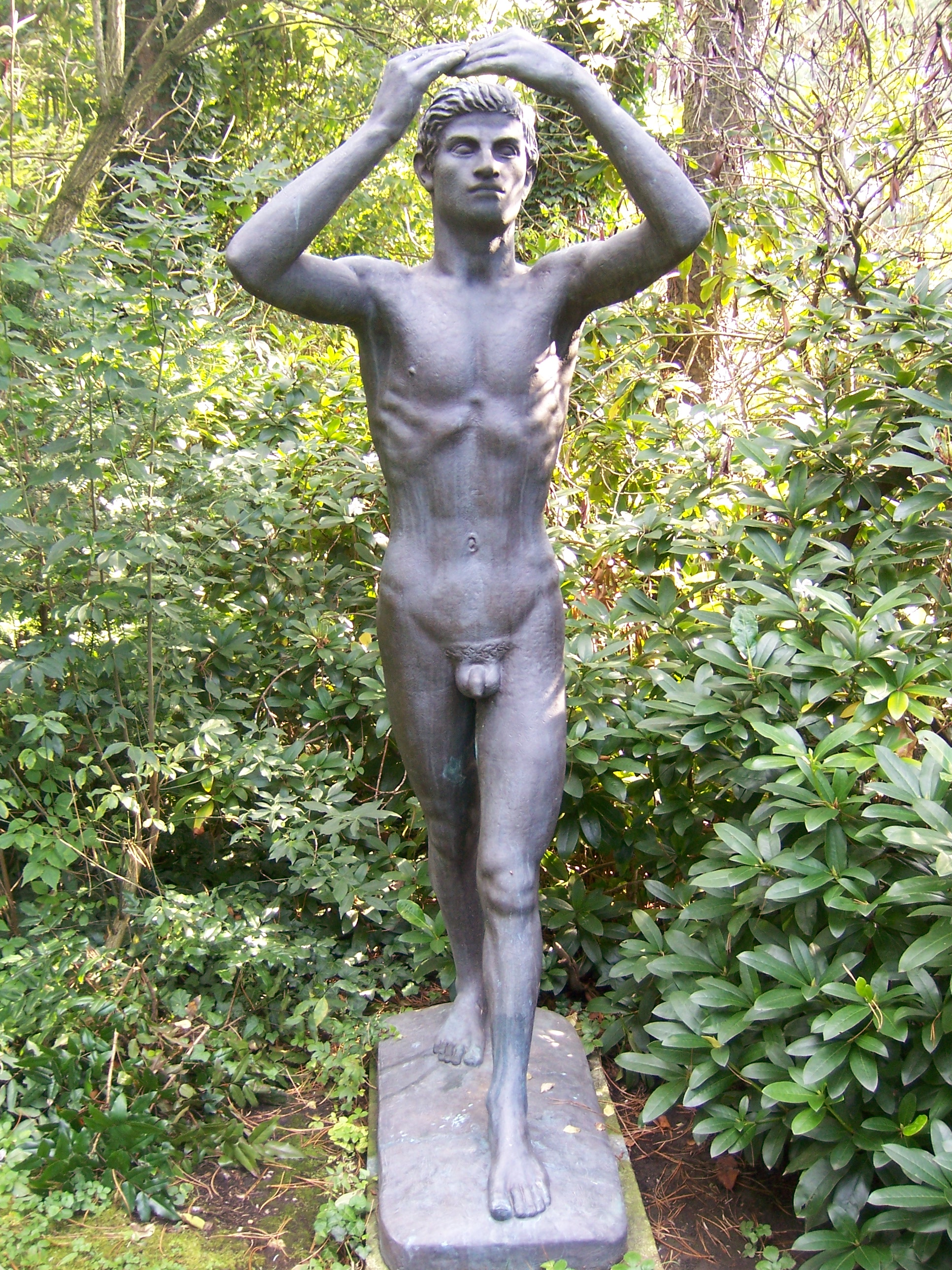 Bernhard Hoetger: Bronzejüngling "Der Tag", 1910